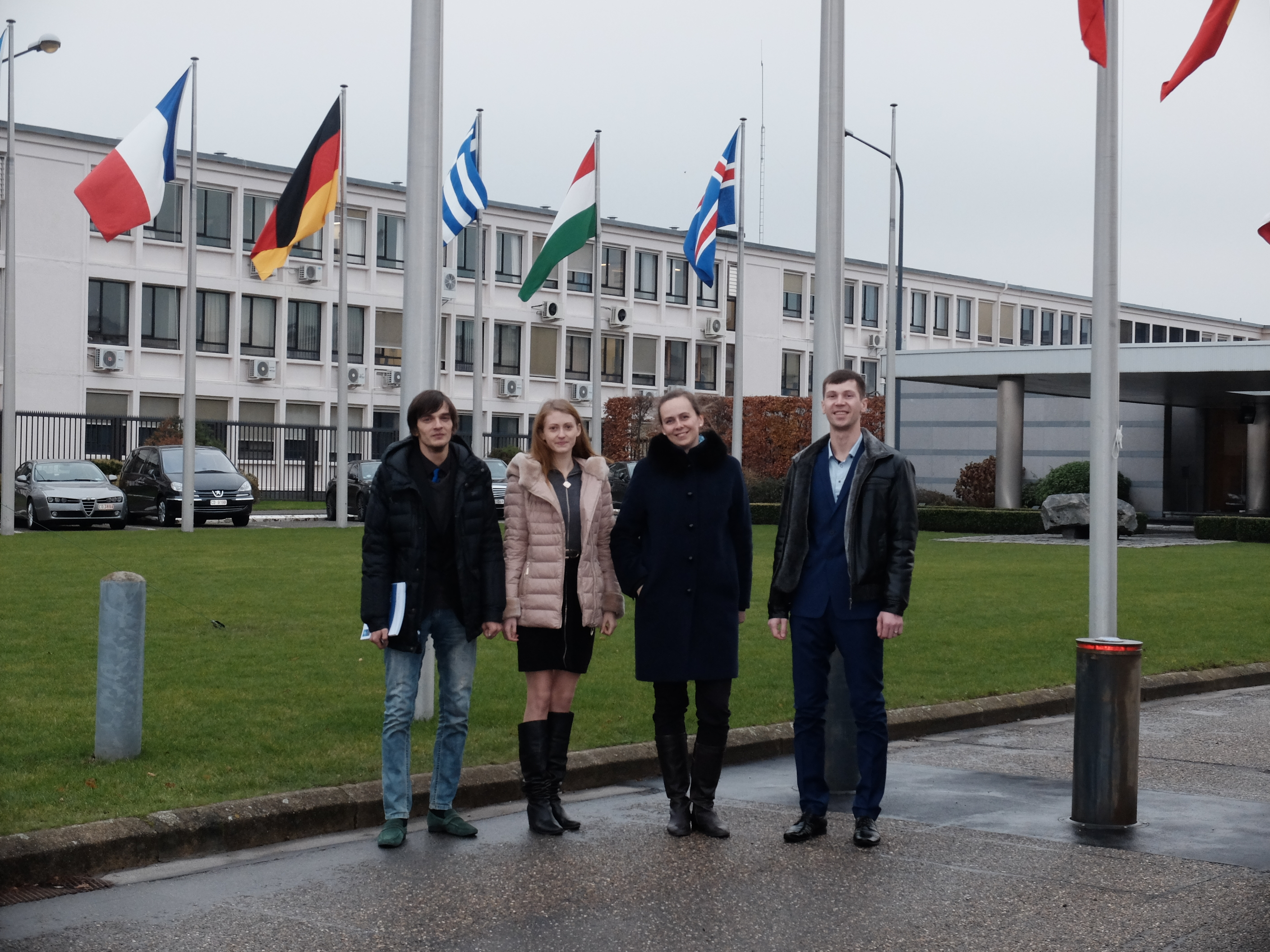 Переможці проекту Нато-квест 2017 (Микола Дьяченко, Вікторія Талаш, Юлія Мансурова зліва направо)